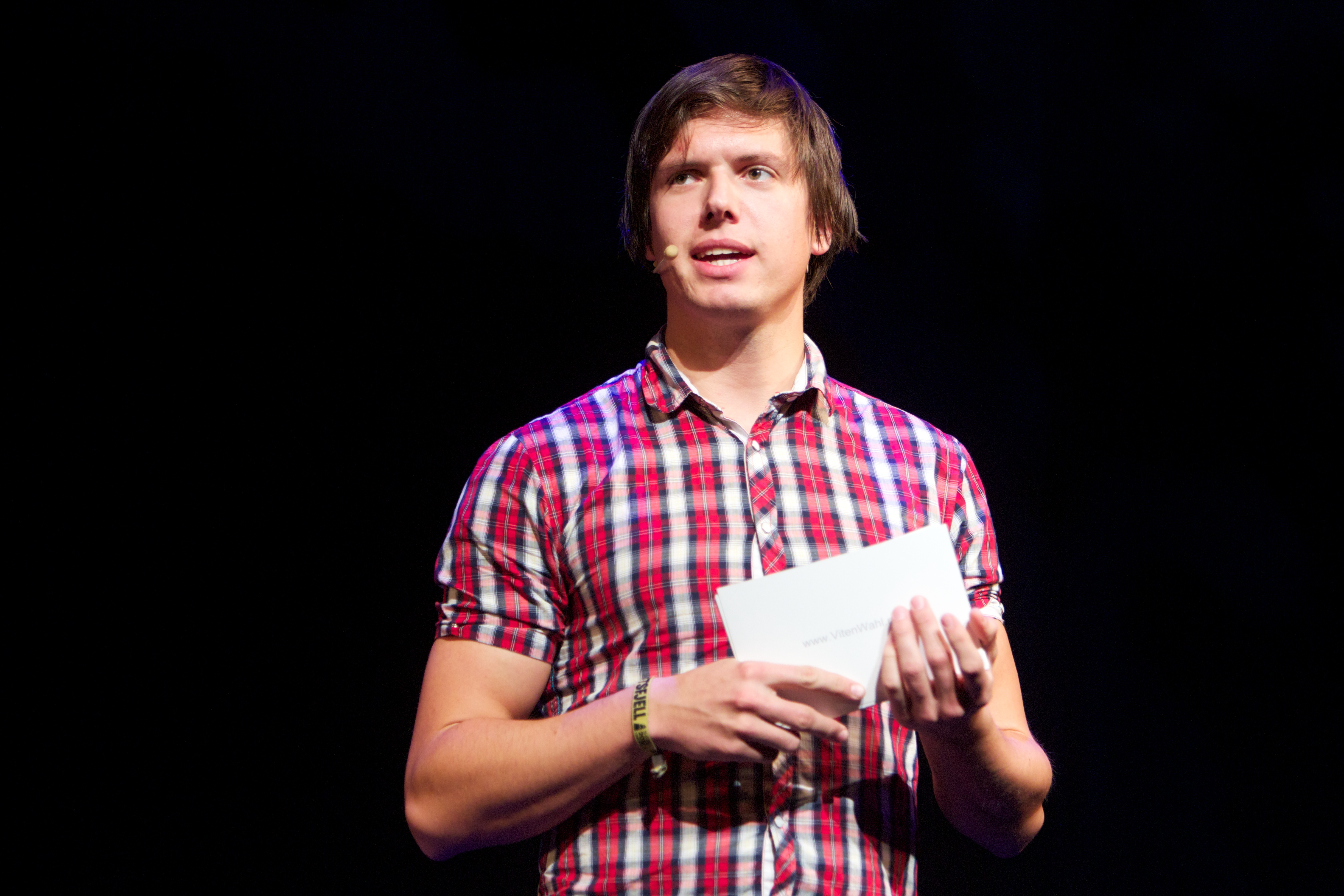 Andreas Wahl er konferansier på AppWorks 2010. Foto / Photo: Eirik Helland Urke